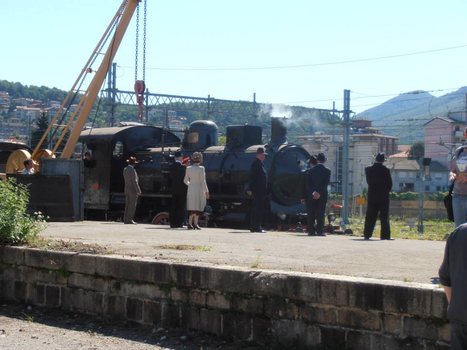 la locomotiva FS 625 usata per le riprese del film "Il pretore" di Giulio Base.